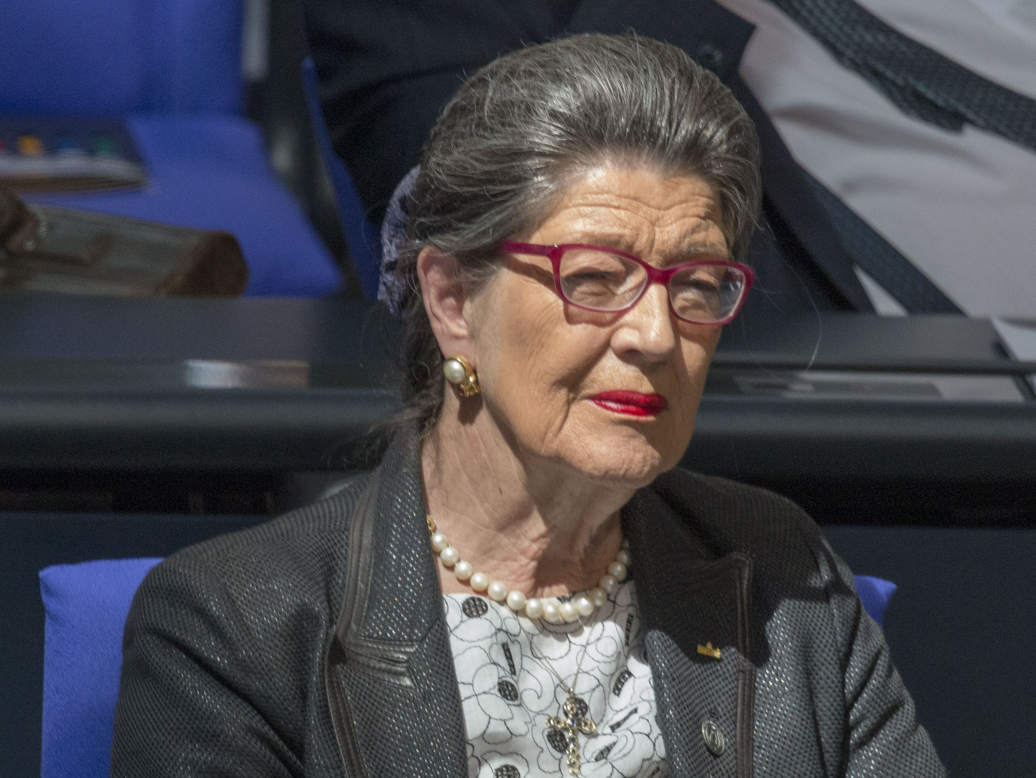 Franziska Gminder, Bundestagsabgeordneter der AfD während der Plenarsitzung des Deutschen Bundestages am 2. Juli 2020 in Berlin.